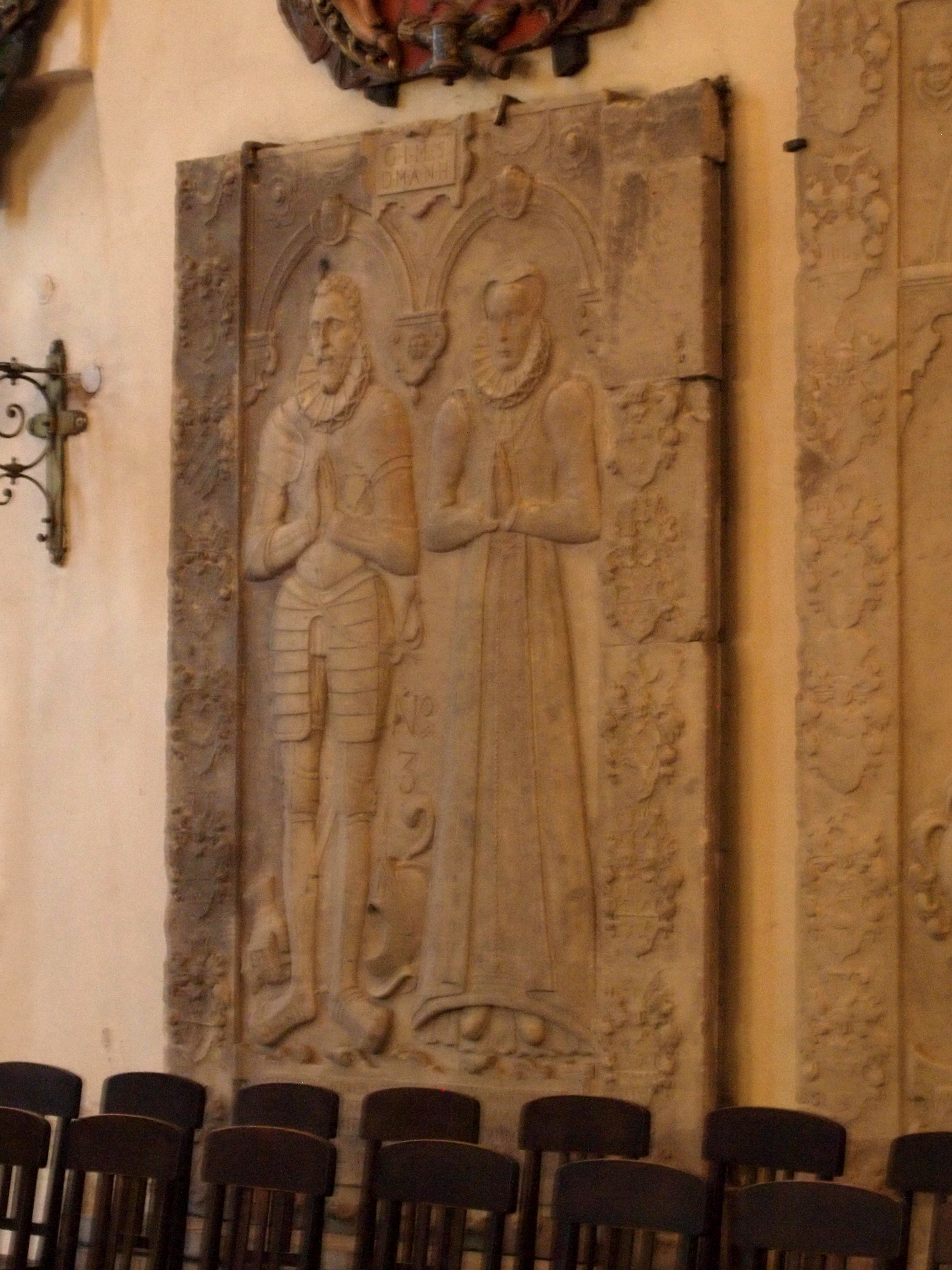 Karl Henriksson Horni ja tema abikaasa hauaplaat Tallinna toomkirikus.